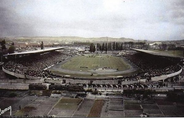 Panorama du Stade Vélodrome de Rocourt